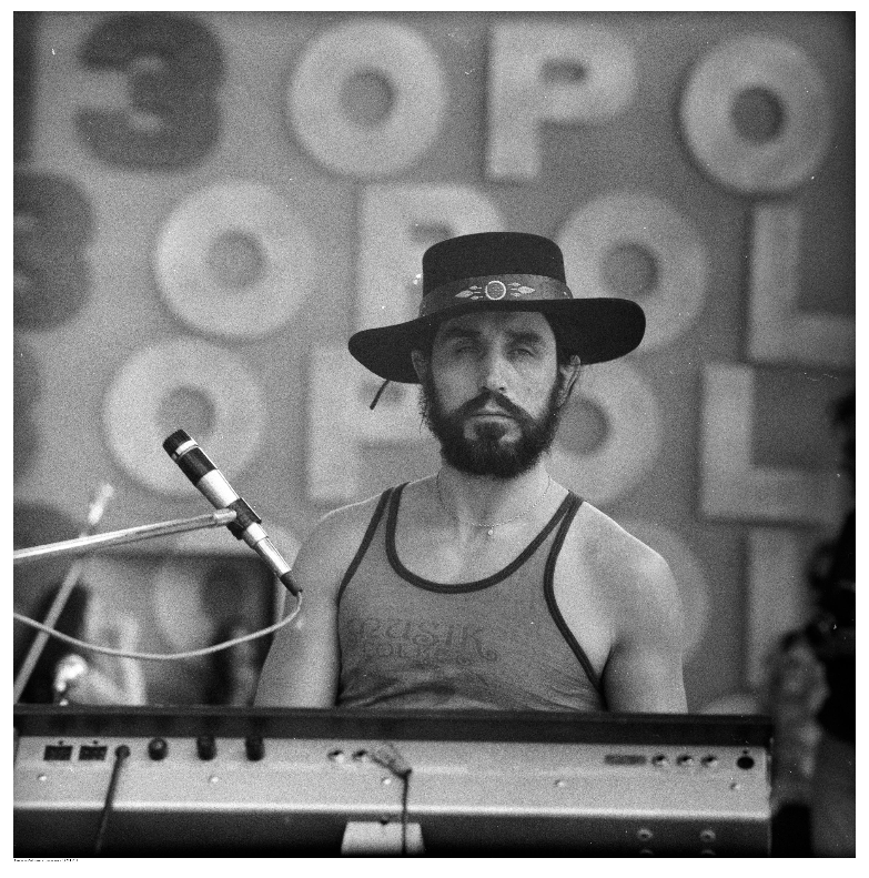 Снимка на Чеслав Немен, по време на изпълнение от XIII-тия фестивал за полски песни в Ополе.